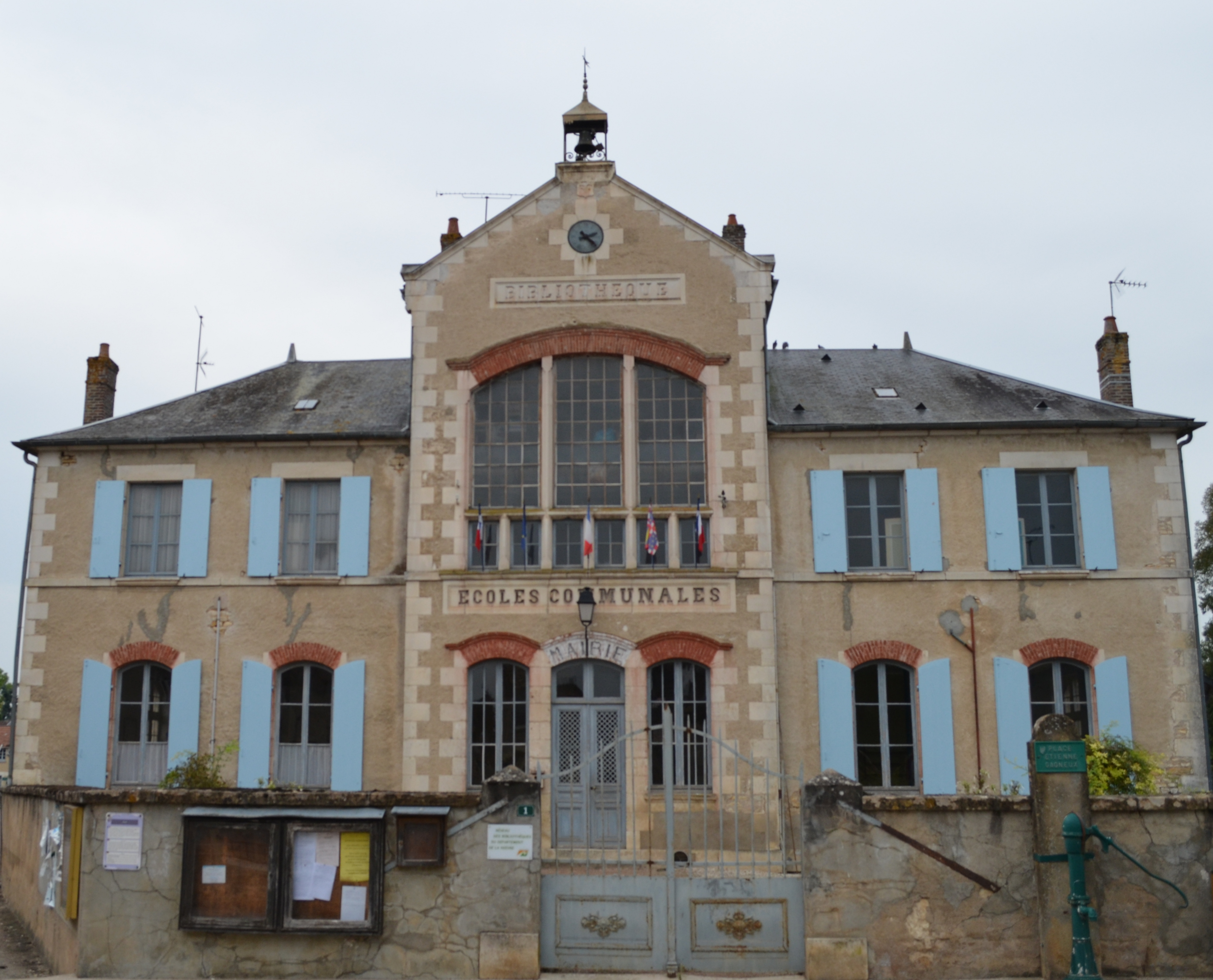 Mairie de Surgy